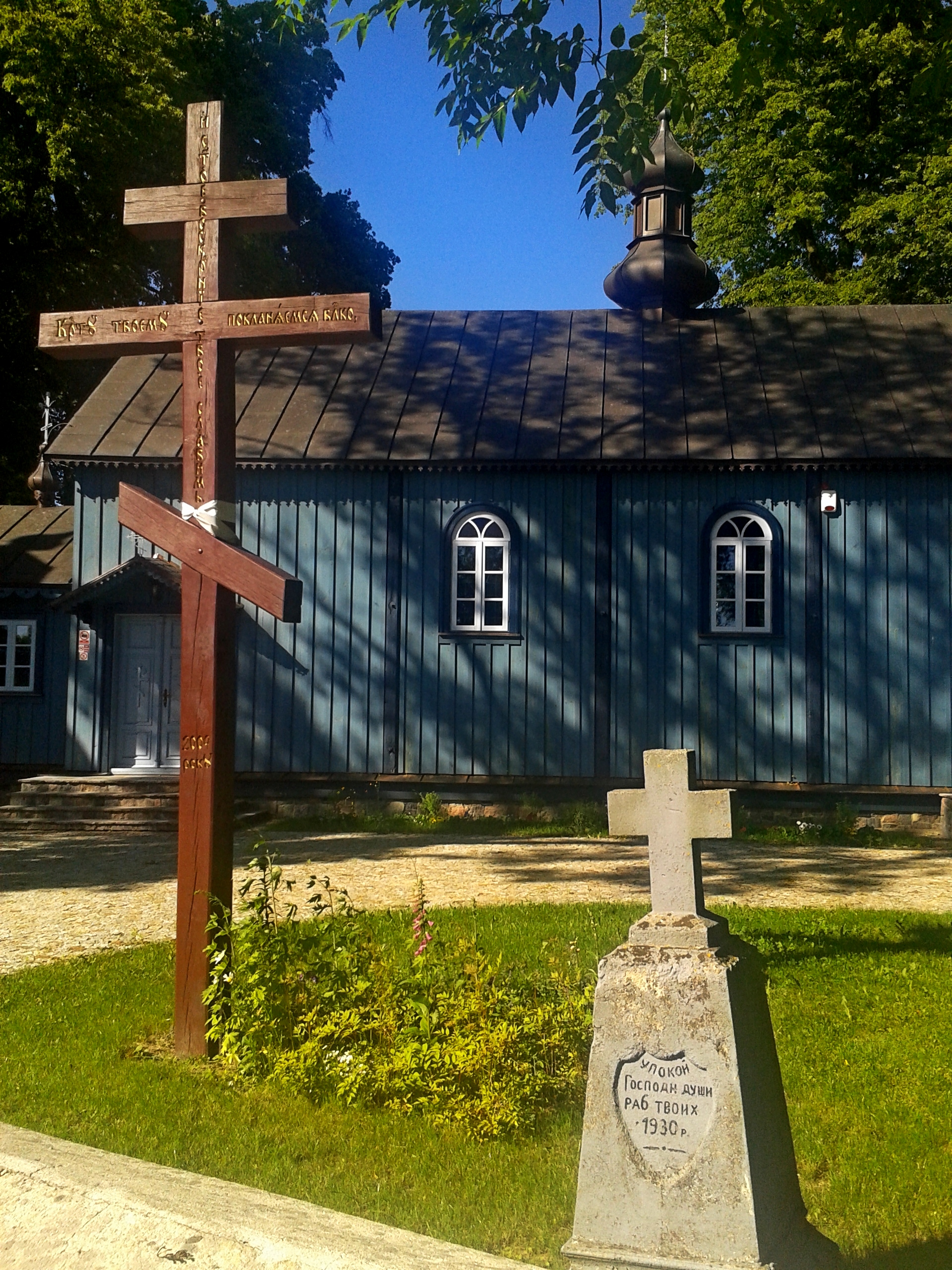 Cerkiew św. Antoniego Pieczerskiego w Holi, krzyż prawosławny i krzyż pamięci zmarłych parafian